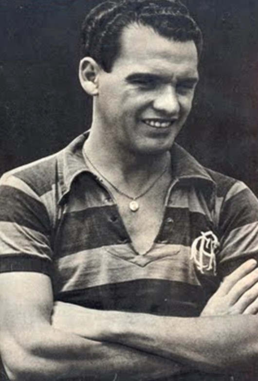 El paraguayo Modesto Bría con camiseta del Flamengo en 1944, cuando conformaba un mediocampo legendario con Jaime de Almeida y Biguá.